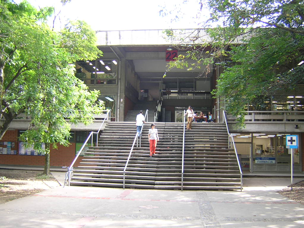 Bloque 22, Universidad de Antioquia, Medellín, Colombia (esta foto la tome yo, y la libero al dominio público)